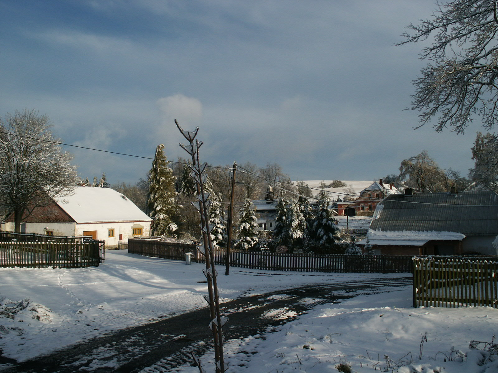 Májůvka centrální část